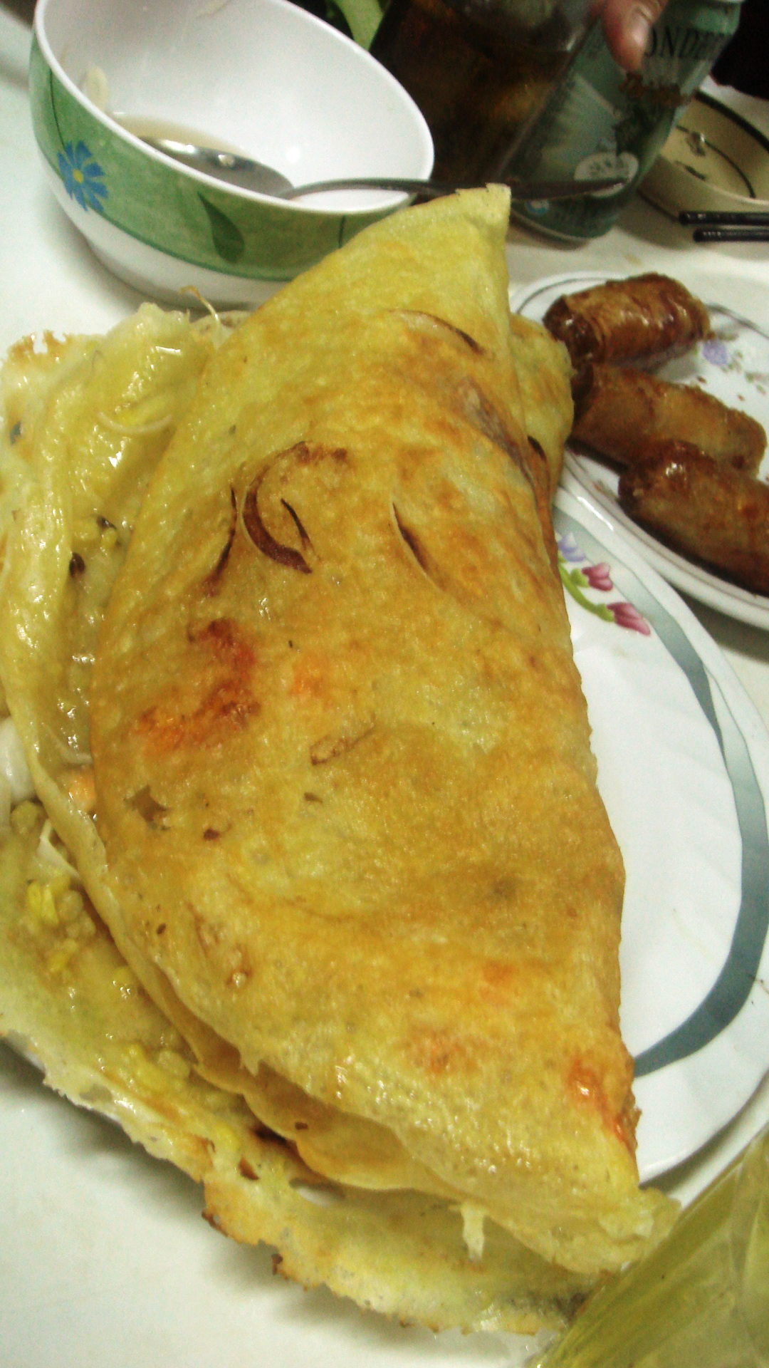 A bánh xèo.